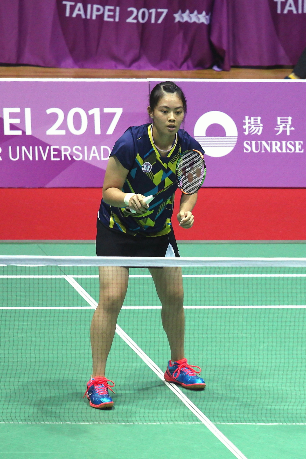 2017 臺北世大運個人混雙 李佳馨 01